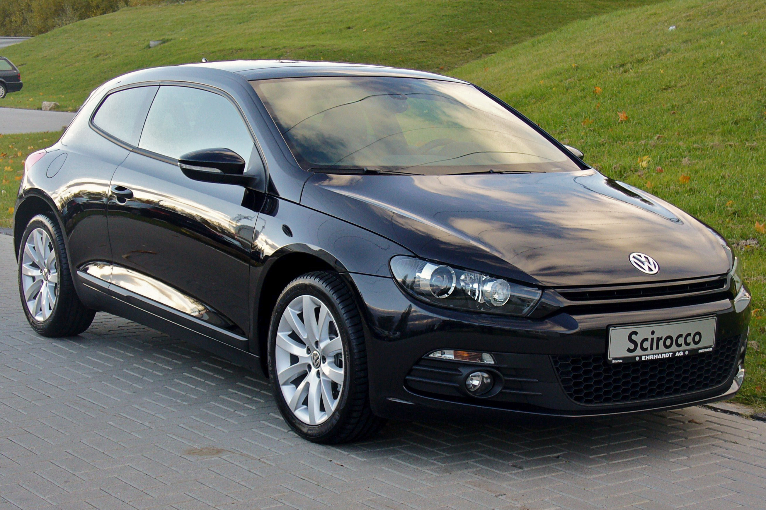 VW Scirocco III